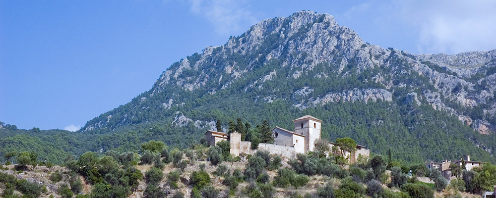 Deia